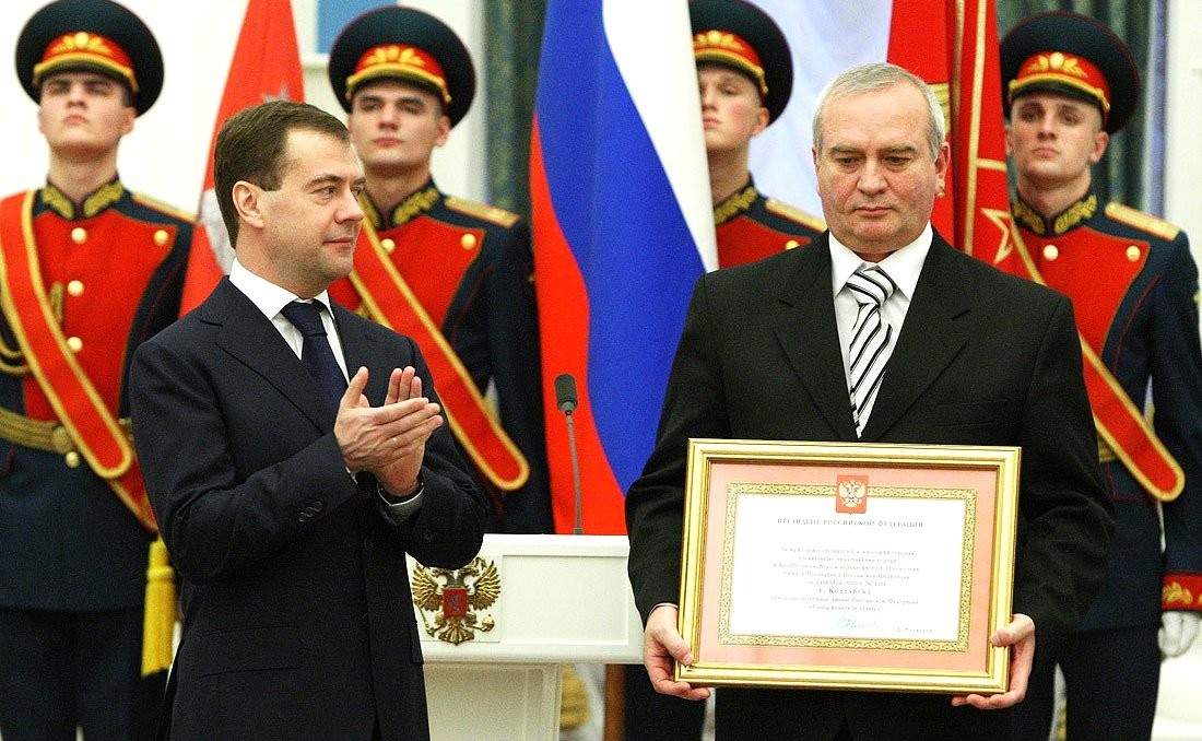 На церемонии вручения грамоты о присвоении звания «Город воинской славы» Козельску.